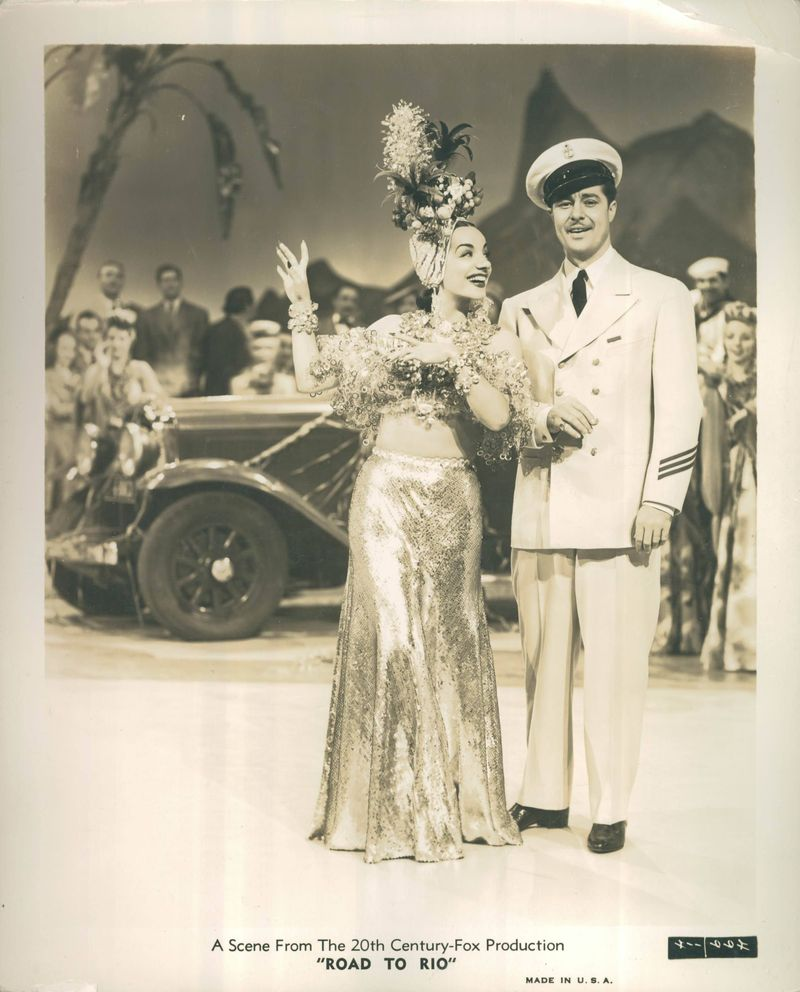 Cena do filme (em inglês That Night in Rio) Uma Noite no Rio de 1941, dirigido por Irving Cummings e protagonizado por Don Ameche, Alice Faye e Carmen Miranda.